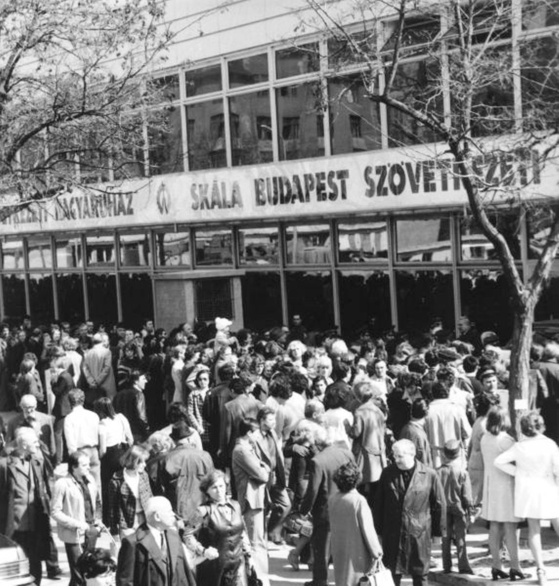 A Skála Budapest Szövetkezeti Nagyáruház megnyitása. Az áruház azóta lebontásra került.